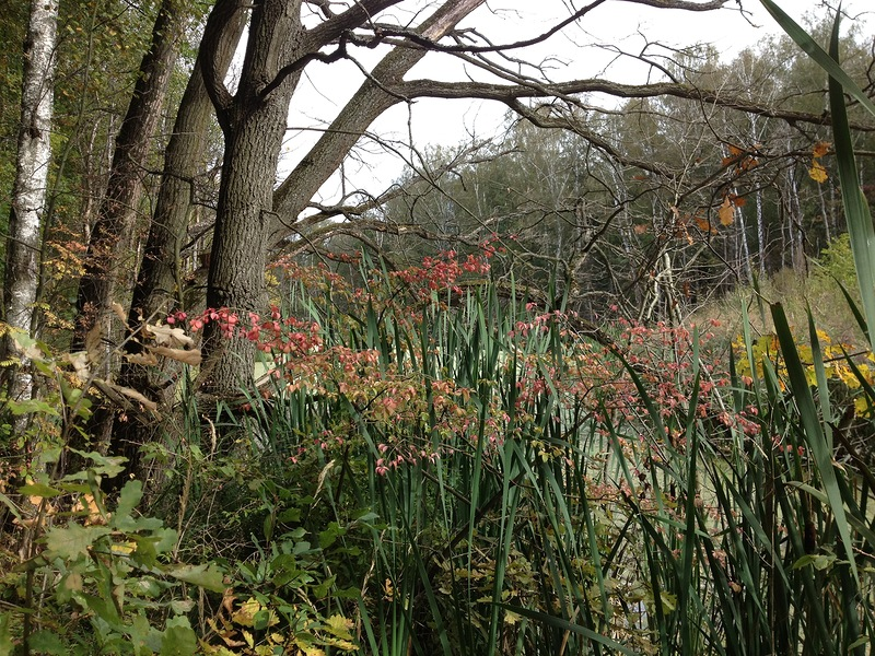 Ульяновский лесопарк - ранняя осень